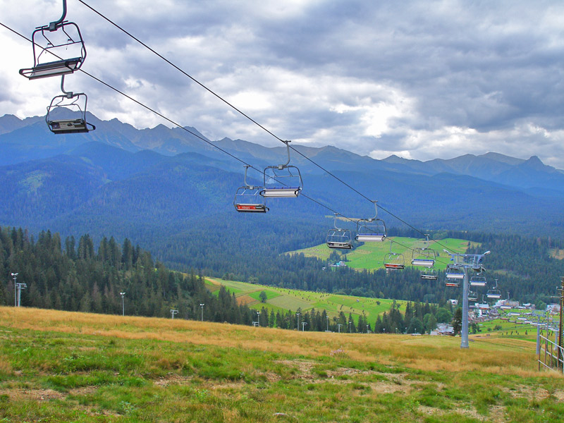 Panorama z Polany Zgorzelisko - Małe Ciche